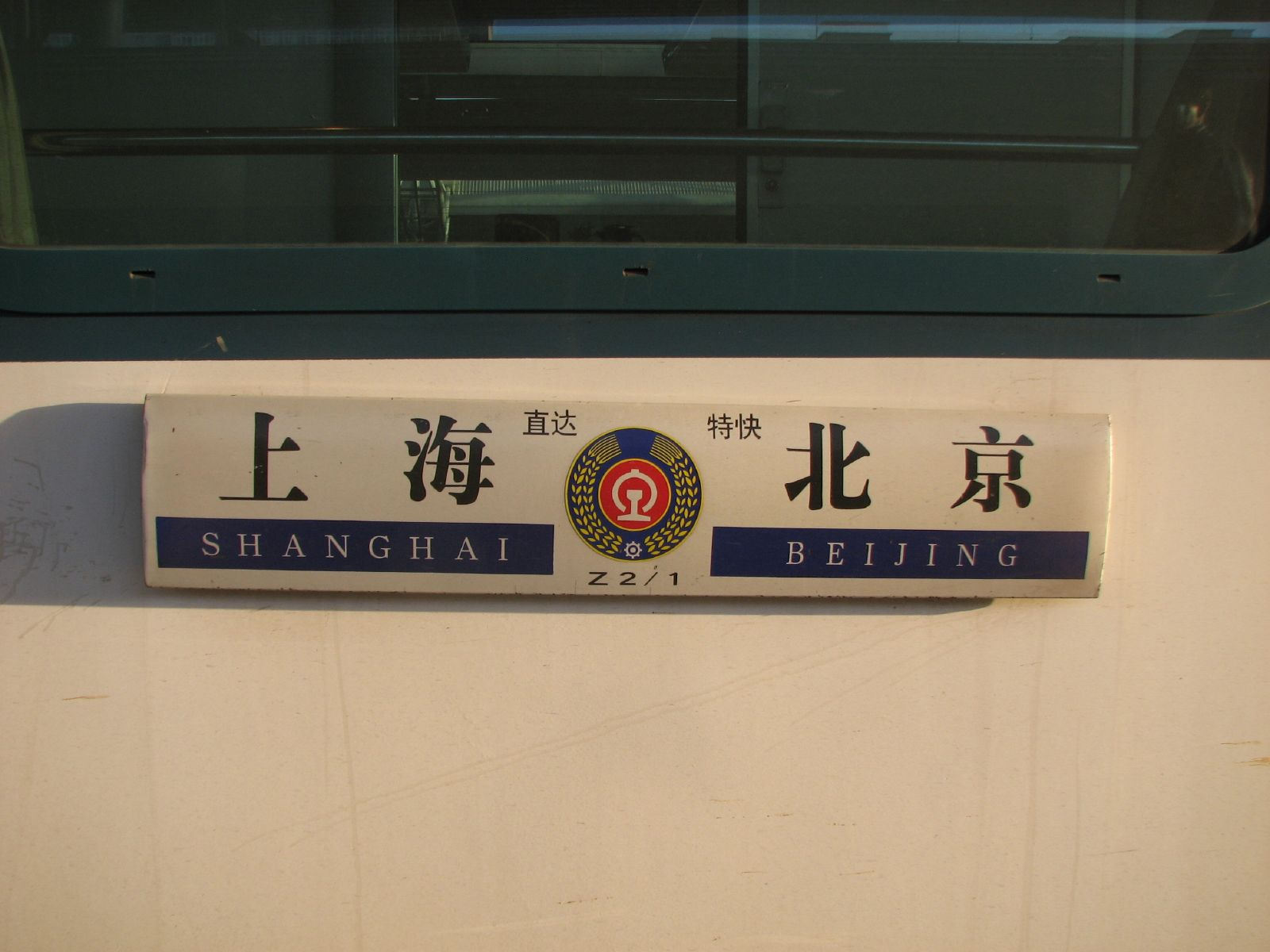 北京至上海Z1/2次列车水牌。